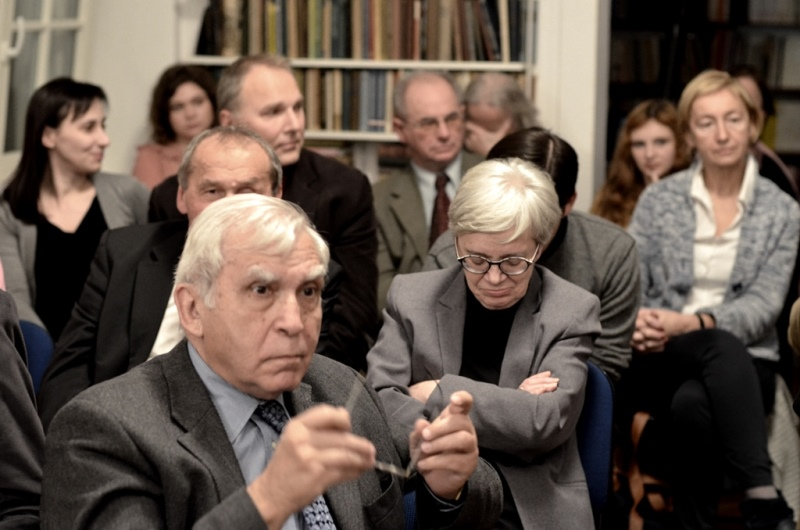 Przekroczyć kredowe koła. Wykład prof. Andrzeja Friszkego w siedzibie Fundacji Geremka n/z: Adam Daniel Rotfeld photo: Monika Lisiewicz